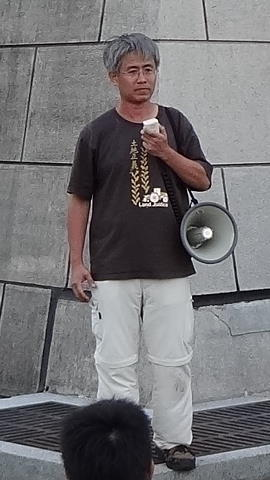 中文（台灣）: 國立臺北大學不動產與城鄉環境學系副教授廖本全，在國立中正紀念堂自由廣場演講。